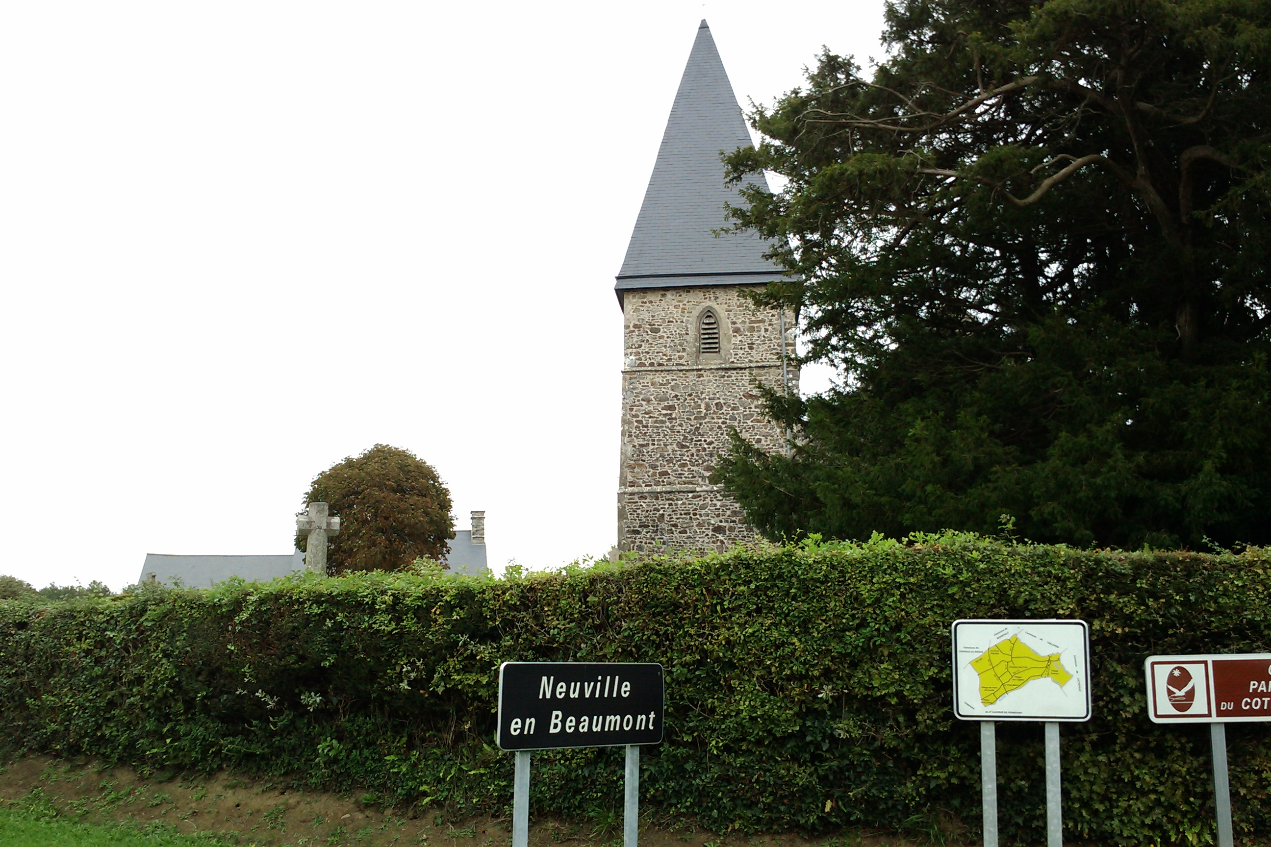 Neuville-en-Beaumont